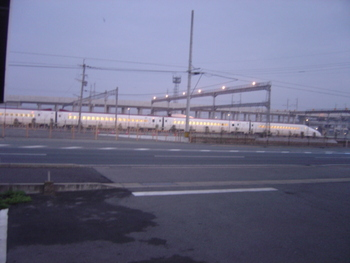 熊本、富合、新幹線車庫